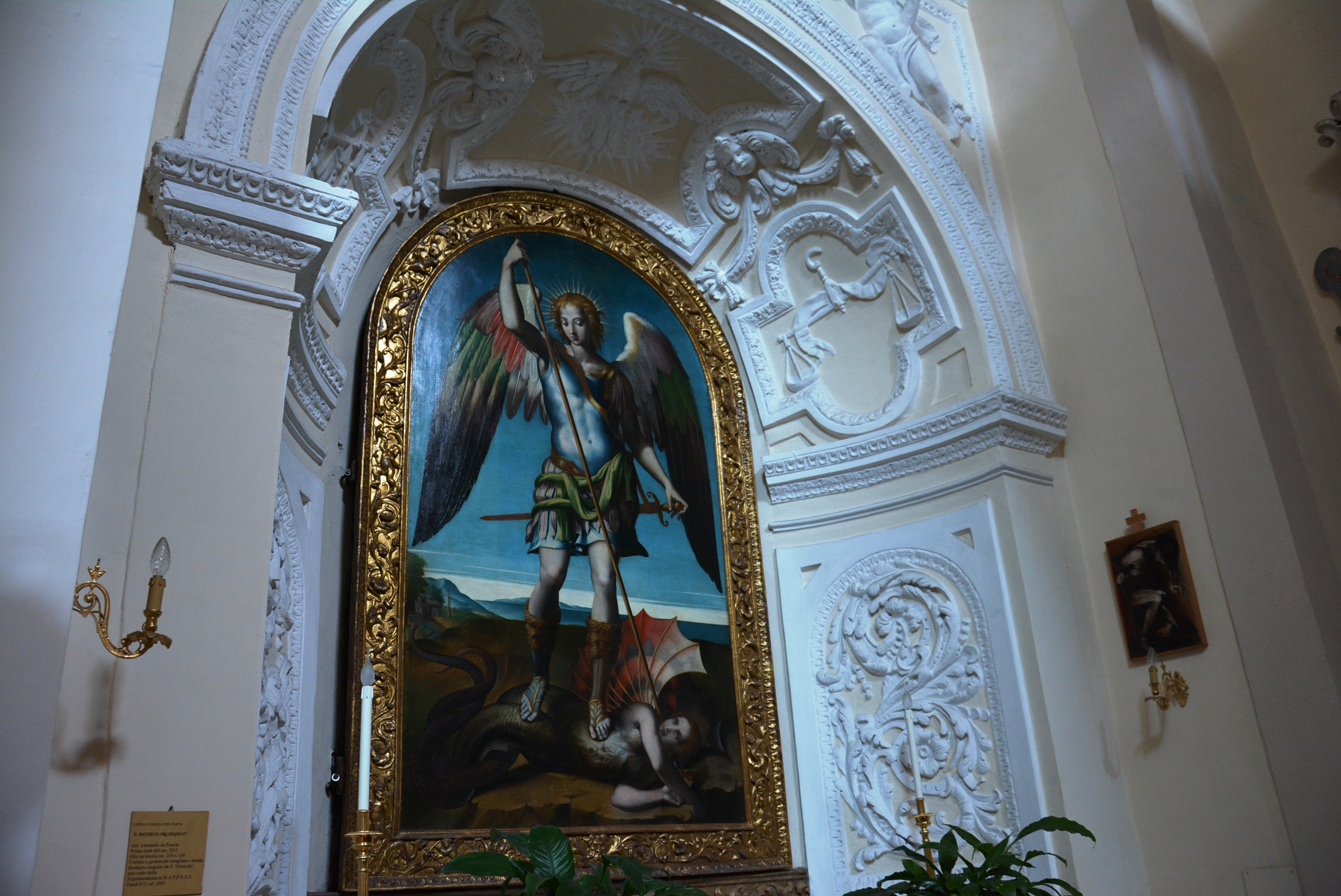 Chiesa di Santa Maria del Parto a Mergellina, a Napoli